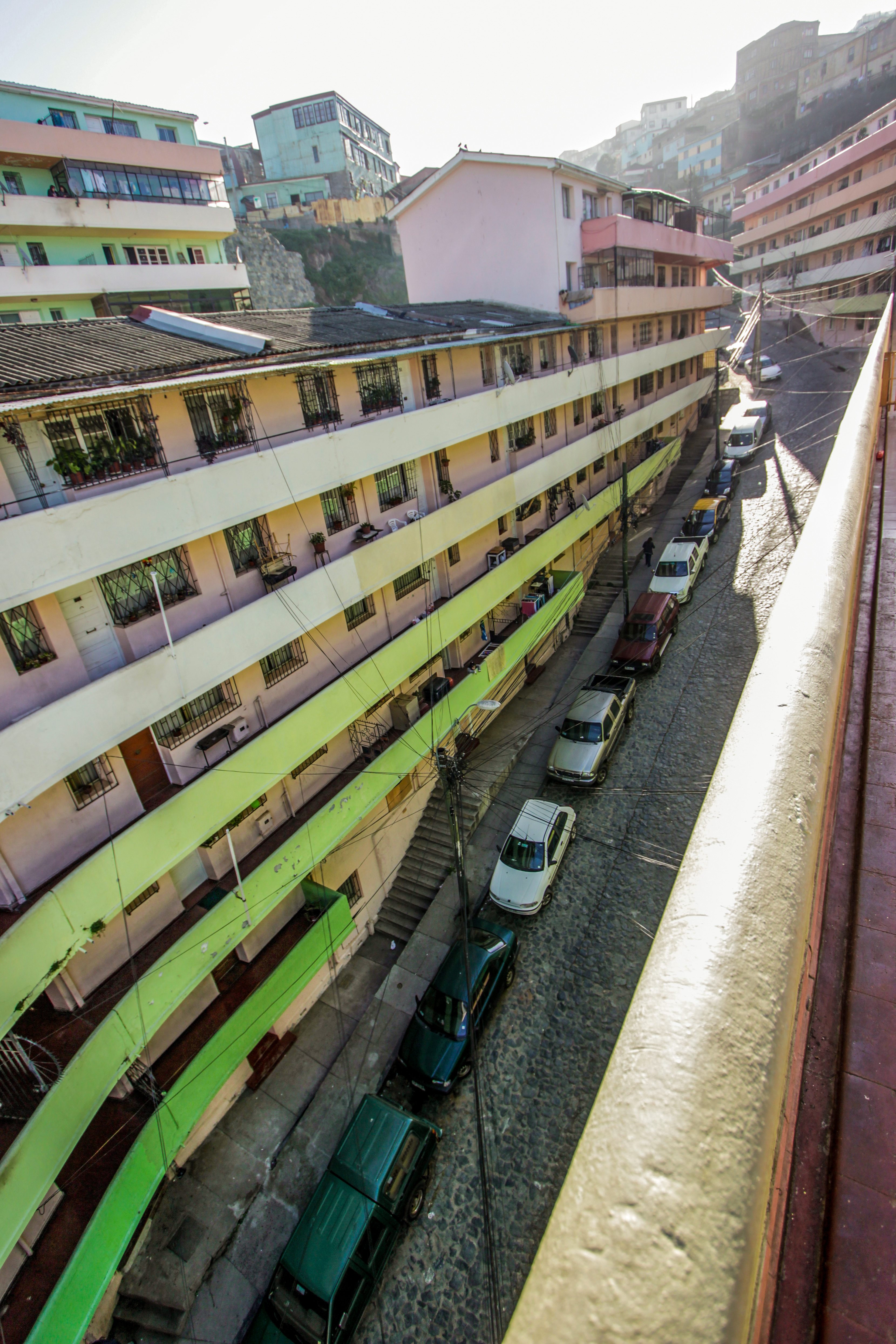 Conjunto Habitacional Quebrada Marquez visto desde el Block B This is a photo of a national monument in Chile: 473